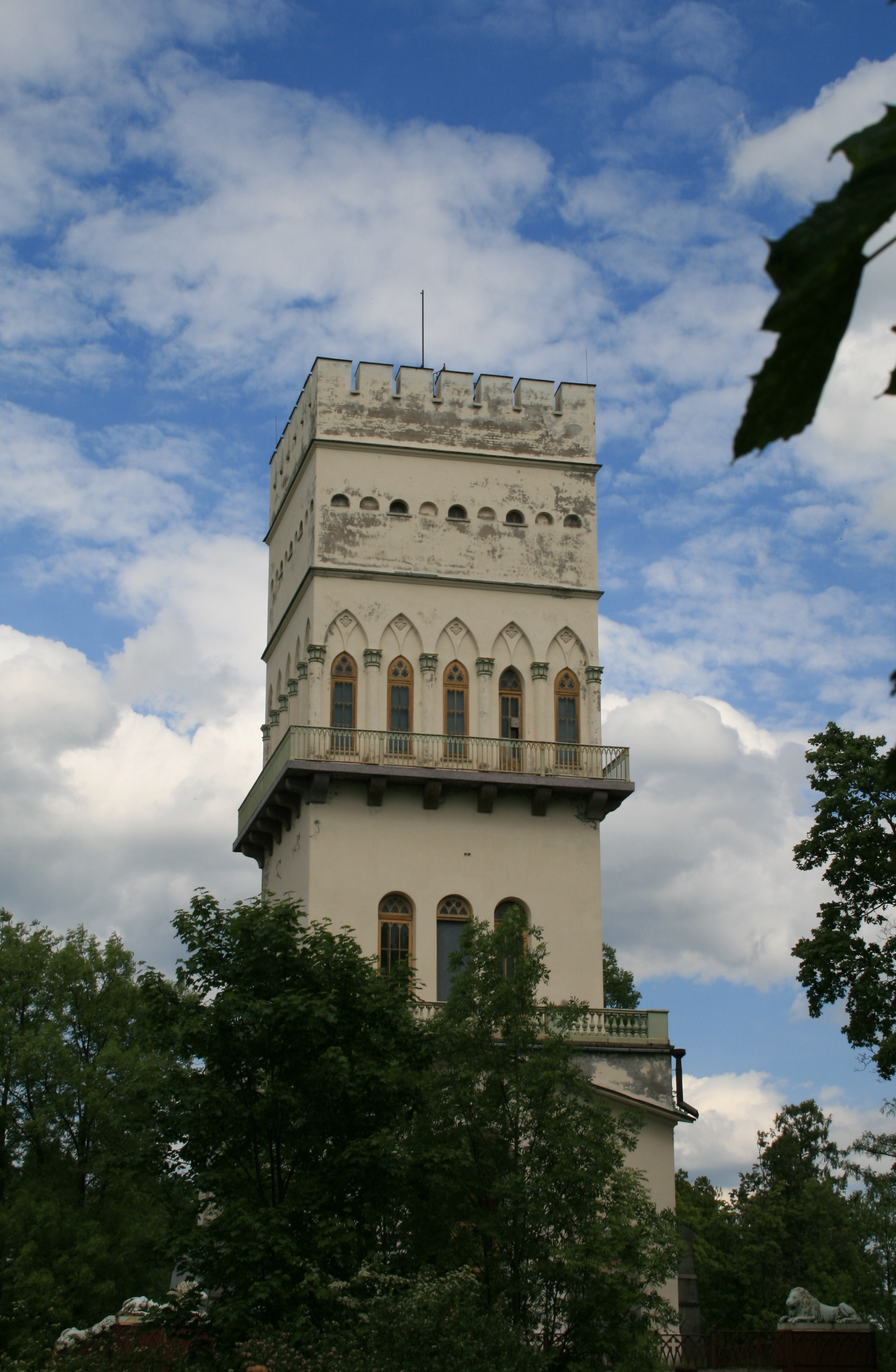 Белая Башня в Александровском саду Царского села